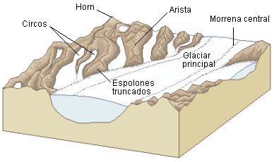 Autor: Usuario:Lmb